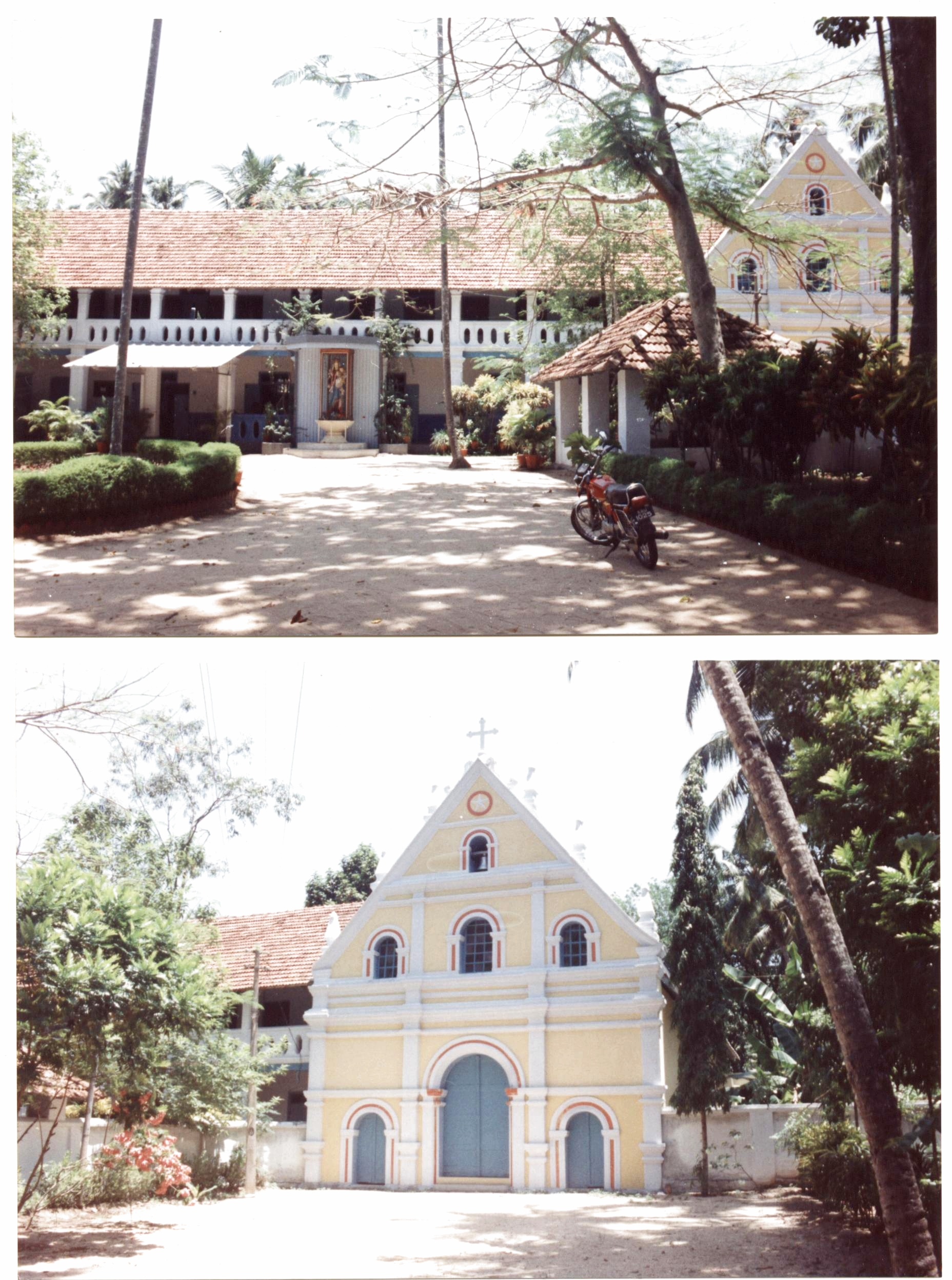 Bischofshaus und bischöfliche Hauskapelle in Kollam (Quilon)